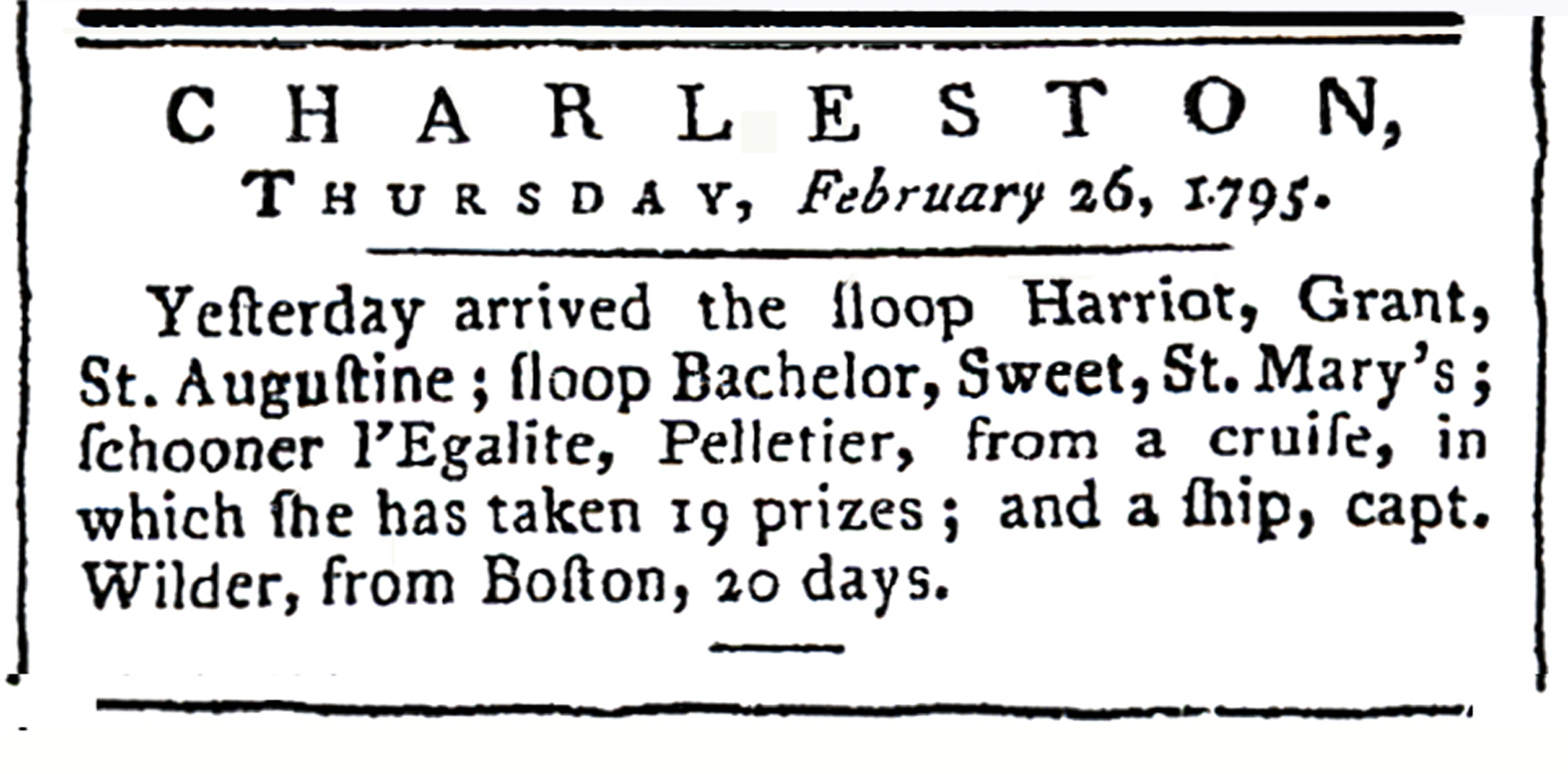 The Georgia Gazettte, 5 mars 1795, p.3, c. 5